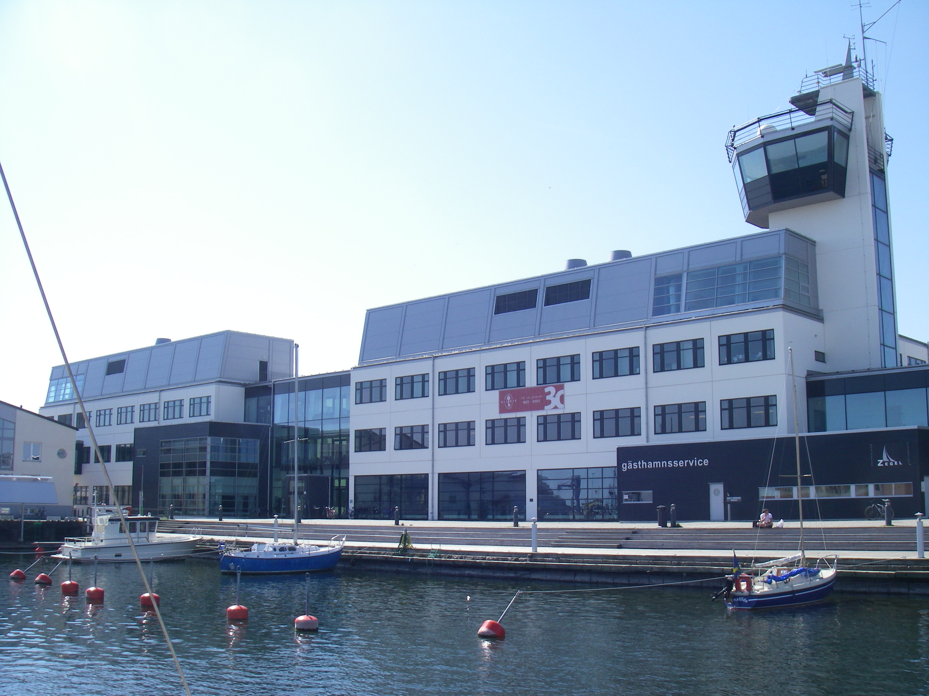 Kalmar Maritime Academy